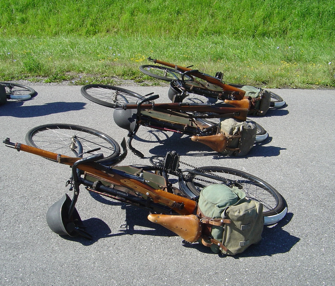 Ordonnanzräder der Schweizer Armee. Mit Karabiner, grüner Rahmentasche, Mantelschutzhülle und Brotsack.